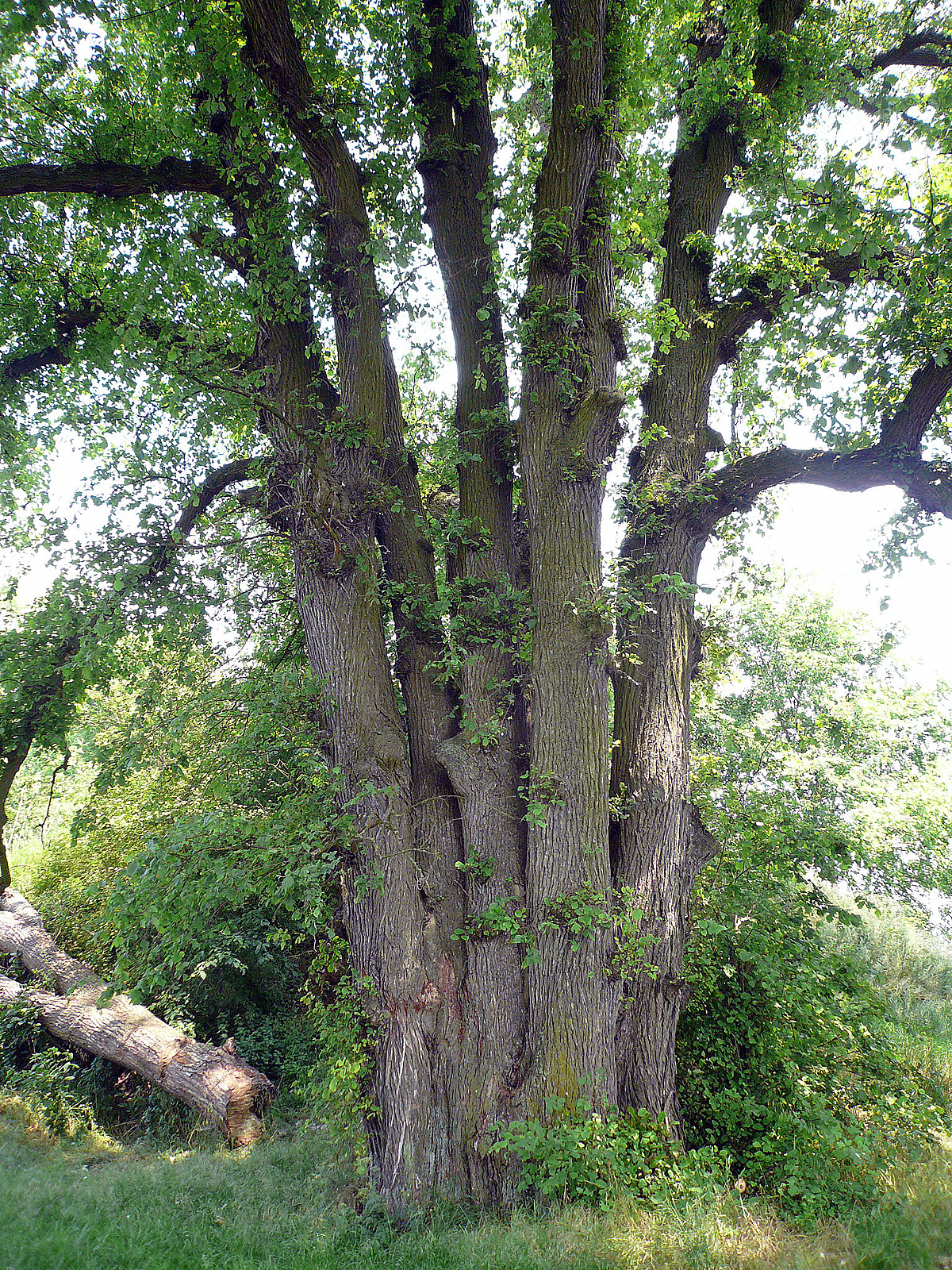 Ulme Obertheres